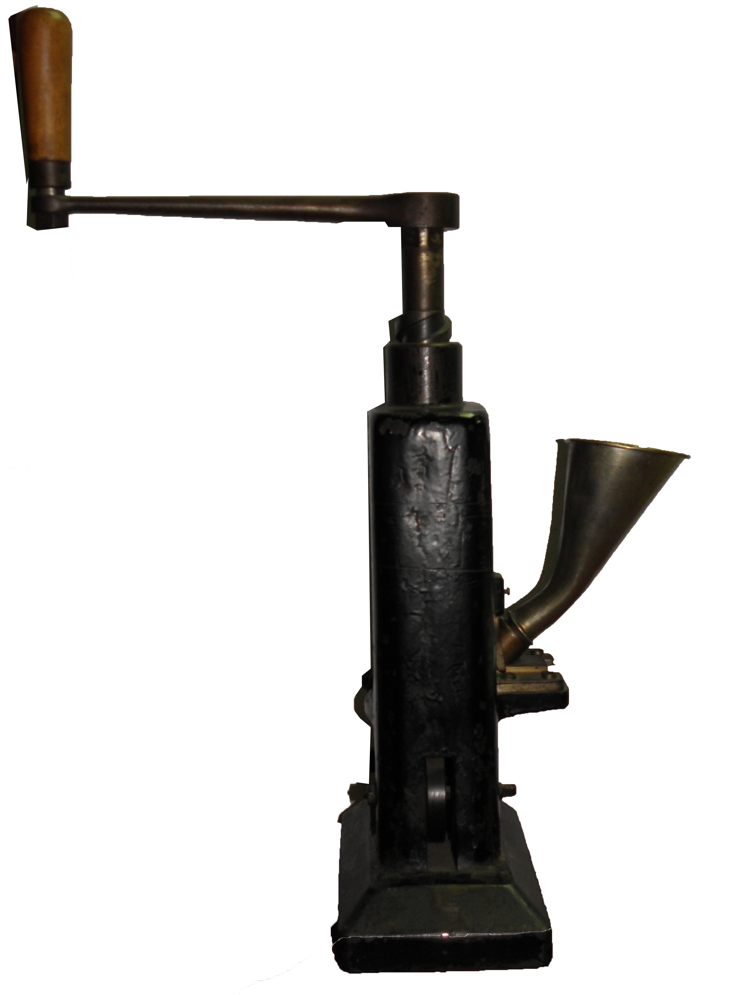 Srpski (latinica): Prva ručna mašina za pravljenje tableta iz fabrike farmaceutskih i hemijskih prozivoda Zdravlje iz Leskovca, 1953 godina.